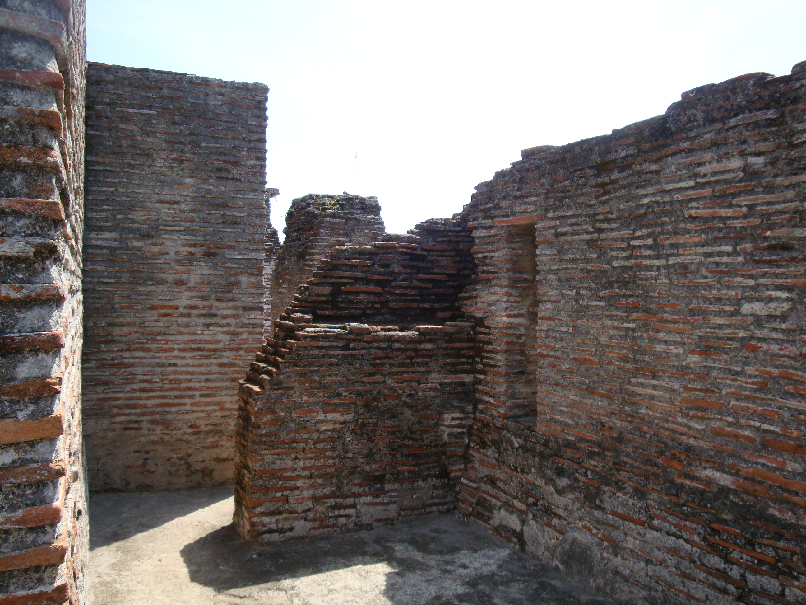 Uno de los cuartos de "El Palacio", en la ciudad maya de Comalcalco, Tabasco, México.